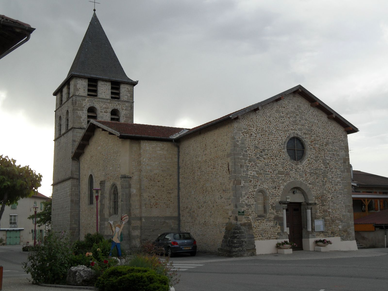 église de Chevrières (isère)